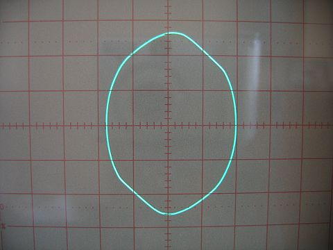 Darstellung der Kennlinie eines Kondensators auf einem Oszilloskop, aufgenommen mit einem Komponententester